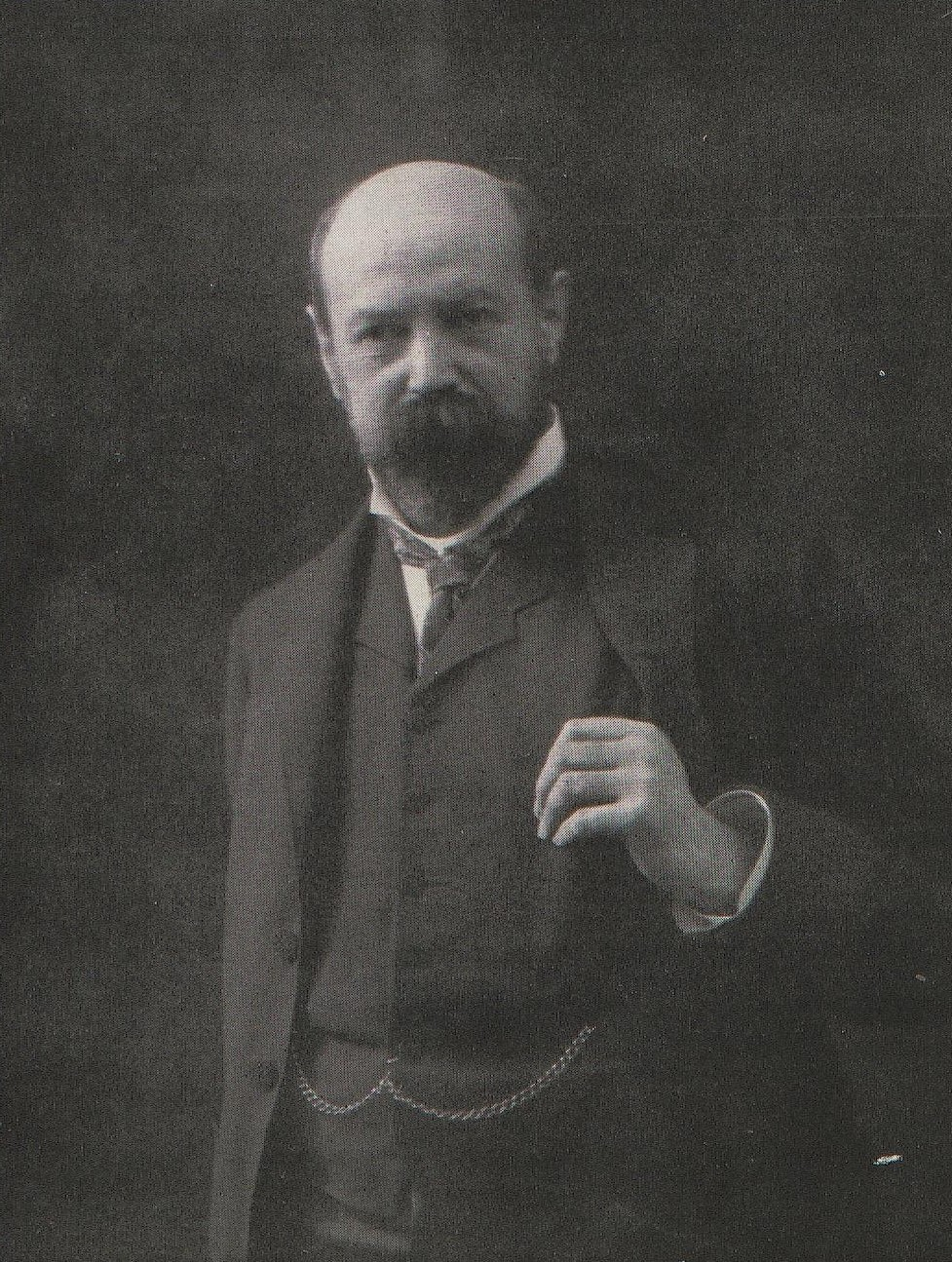 Portrait des Architekten Alfred Messel